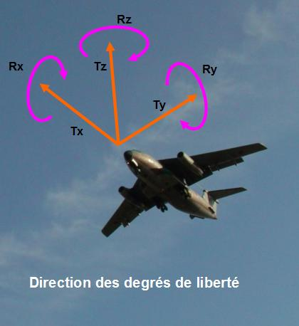 photo personnelle d'un avion militaire japonais. modification sous word.